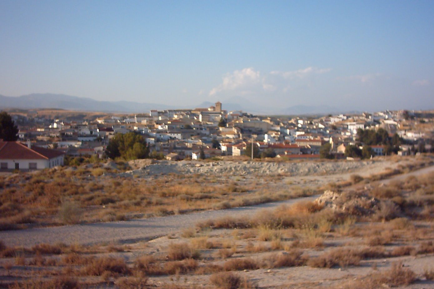 Panorámica de la localidad de Benamaurel (Granada, España) desde el paraje de La Loma.